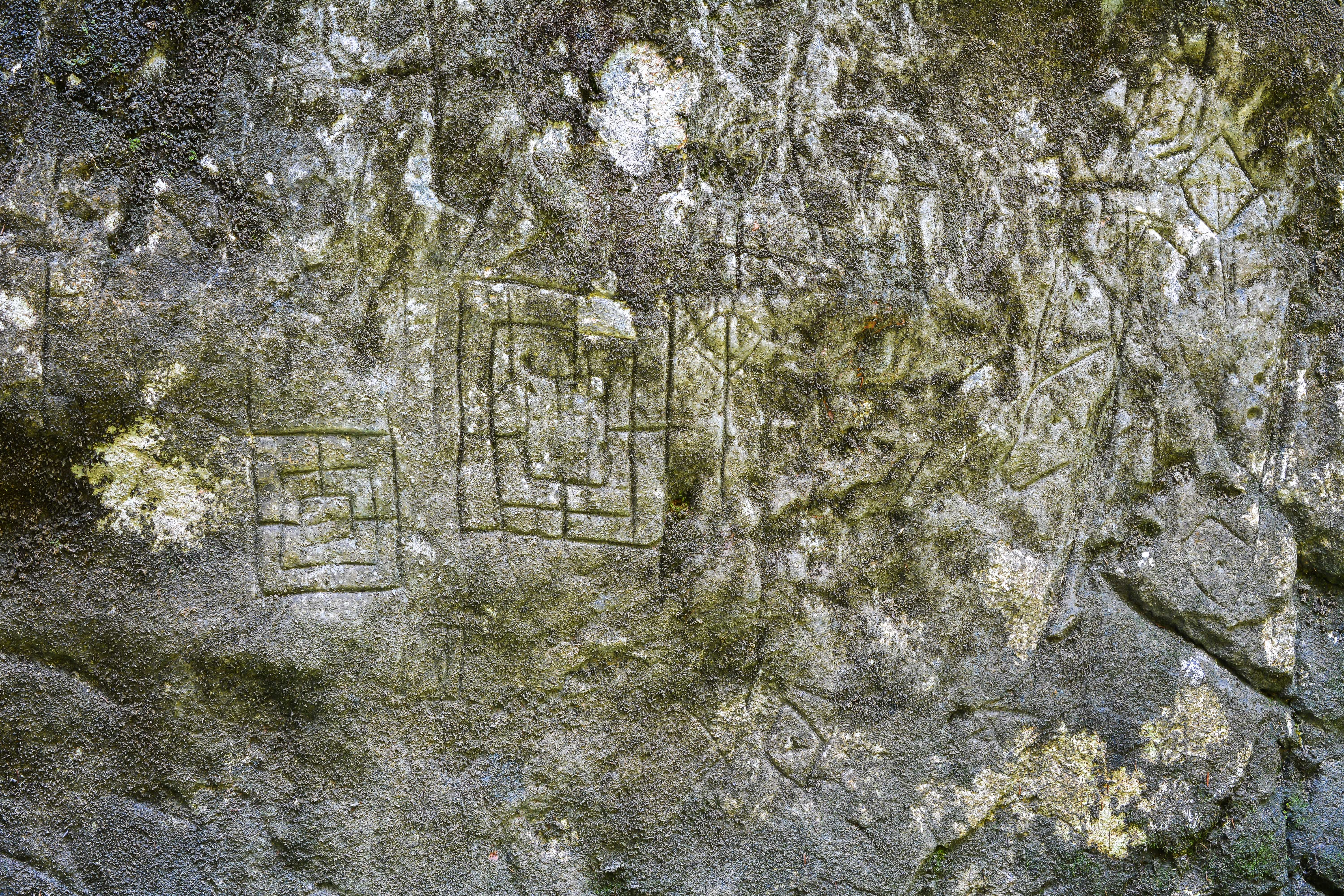 Felsbildstation "Höll". Am Bildfelsen V (Nummerierung gemäß Burgstaller/Kiesenhofer/Freh/Lauth, 1961 finden sich unter teilweise starkem Bewuchs durch Flechten und Moose Darstellungen von Tieren, geometrischen Formen, Bäumen und Menschen.